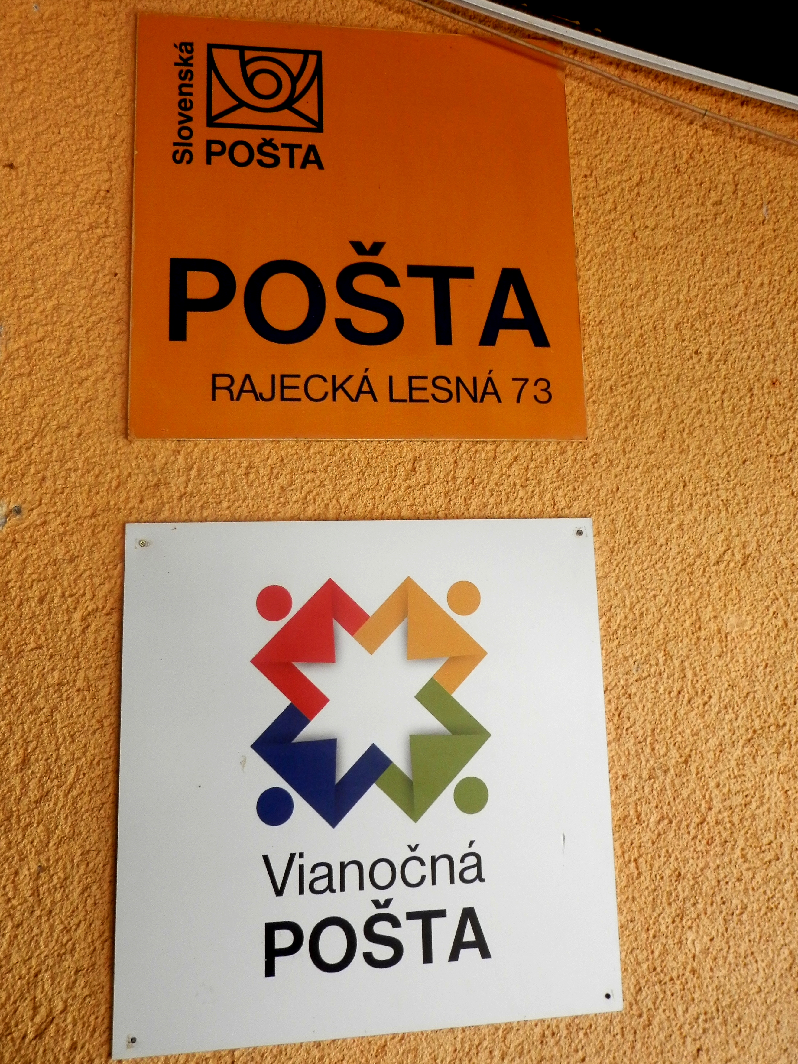 Jar 2018. Budova pošty s poštovou schránkou Vianočná pošta. Obec Rajecká Lesná, okres Žilina. Slovensko